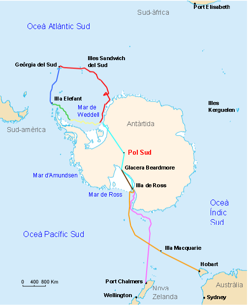 Mapa de les rutes dels vaixells Endurance i Aurora, la ruta de l'equip de suport, i la ruta prevista de l'Expedició Endurance liderada per Ernest Shackleton el 1914–15. Viatge de l'Endurance Deriva de l'Endurance en el gel Deriva del mar gelat després de l'enfonsament de l'Endurance Viatge del James Caird Ruta transantàrtica prevista Viatge de l'Aurora a l'Antàrtida Retirada de l'Aurora Ruta de subministrament